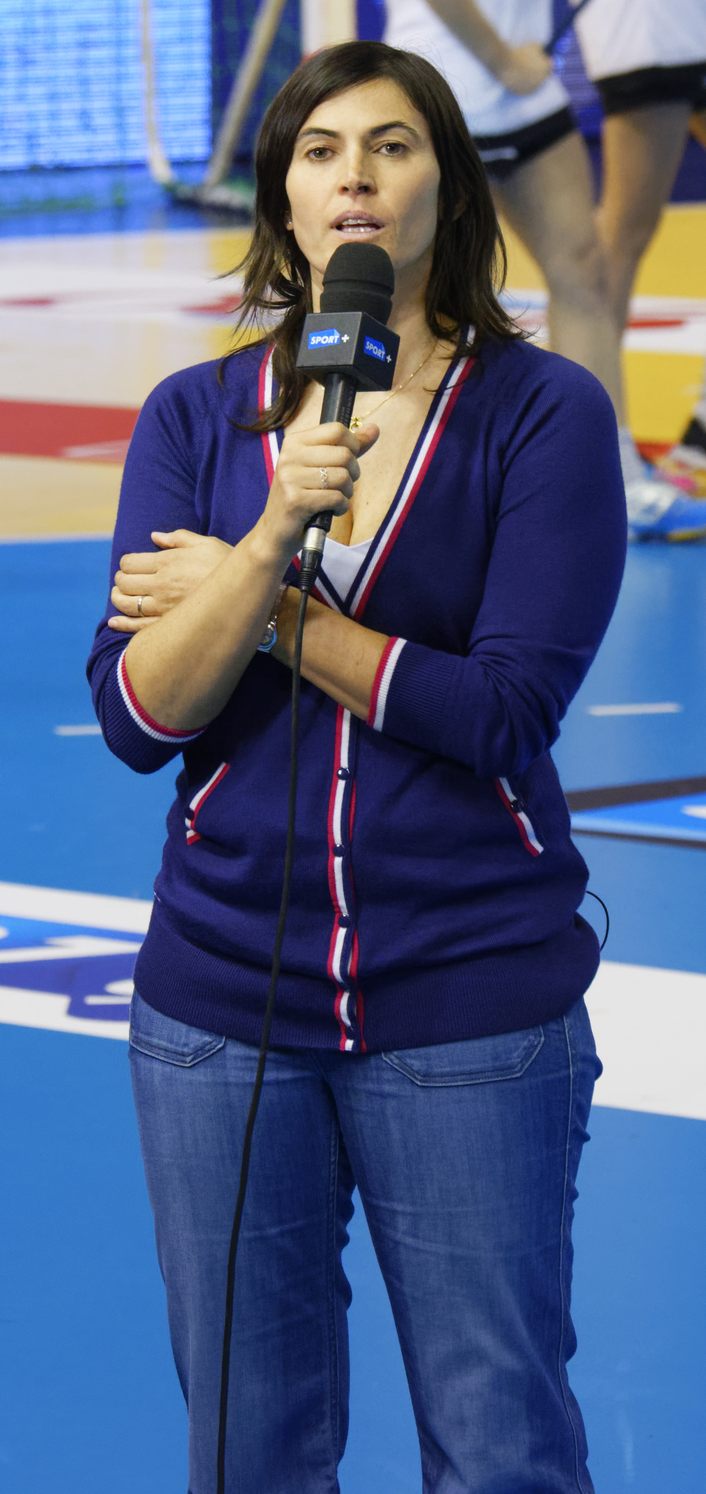 Rencontre entre la France et le Danemark lors de la Golden League 2015. A Dijon, le 19 mars 2015.